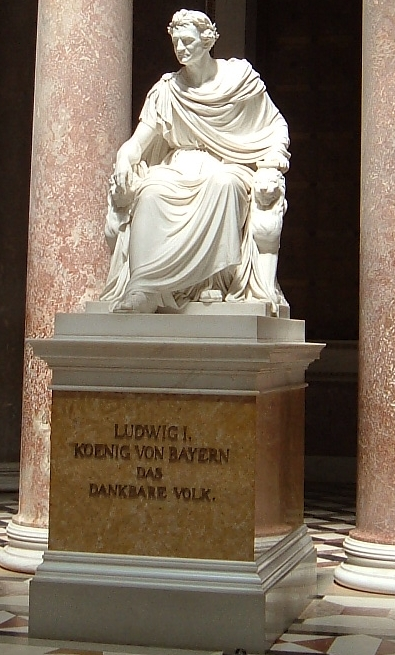 Ludwig I. - König von Bayern in der Walhalla